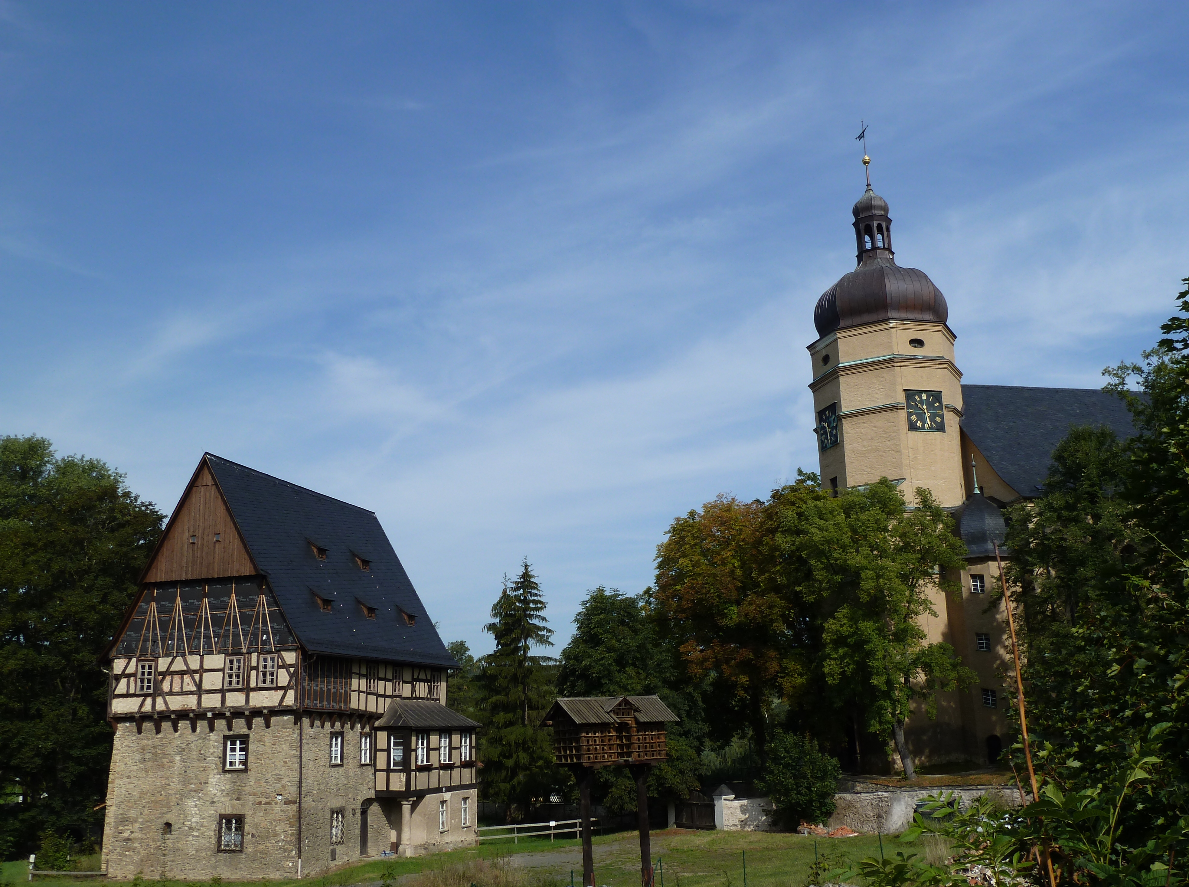 Das ehemalige Herrenhaus des Rittergutes mit dem Taubenhaus. Dahinter, etwas höherliegend, die Salvatorkirche.